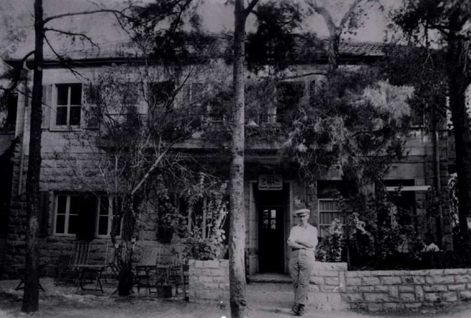 פנסיון מרגוע החלוץ 25 בית הכרם